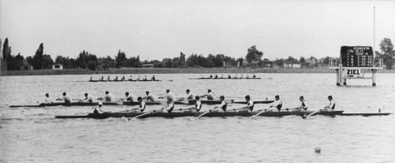 Beetzsee, Ruderregatta, Achterrennen Zentralbild Wendorf-20.7.69 Brandenburg: 1. Verbandstreffen des Deutschen Rudersport-Verbandes der DDR- Höhepunkt und Abschluß des Verbandstreffens bildete die deutsche Meisterschaft der DDR im Rudern. Den Titel im Elite-Achter der Männer gewannen überraschend mit hauchdünnem Vorsprung vor dem TSC Berlin (2.v.hinten), die Männer des ASK Vorwärts Rostock in der blendenden Zeit von 5:46:36 Minuten.